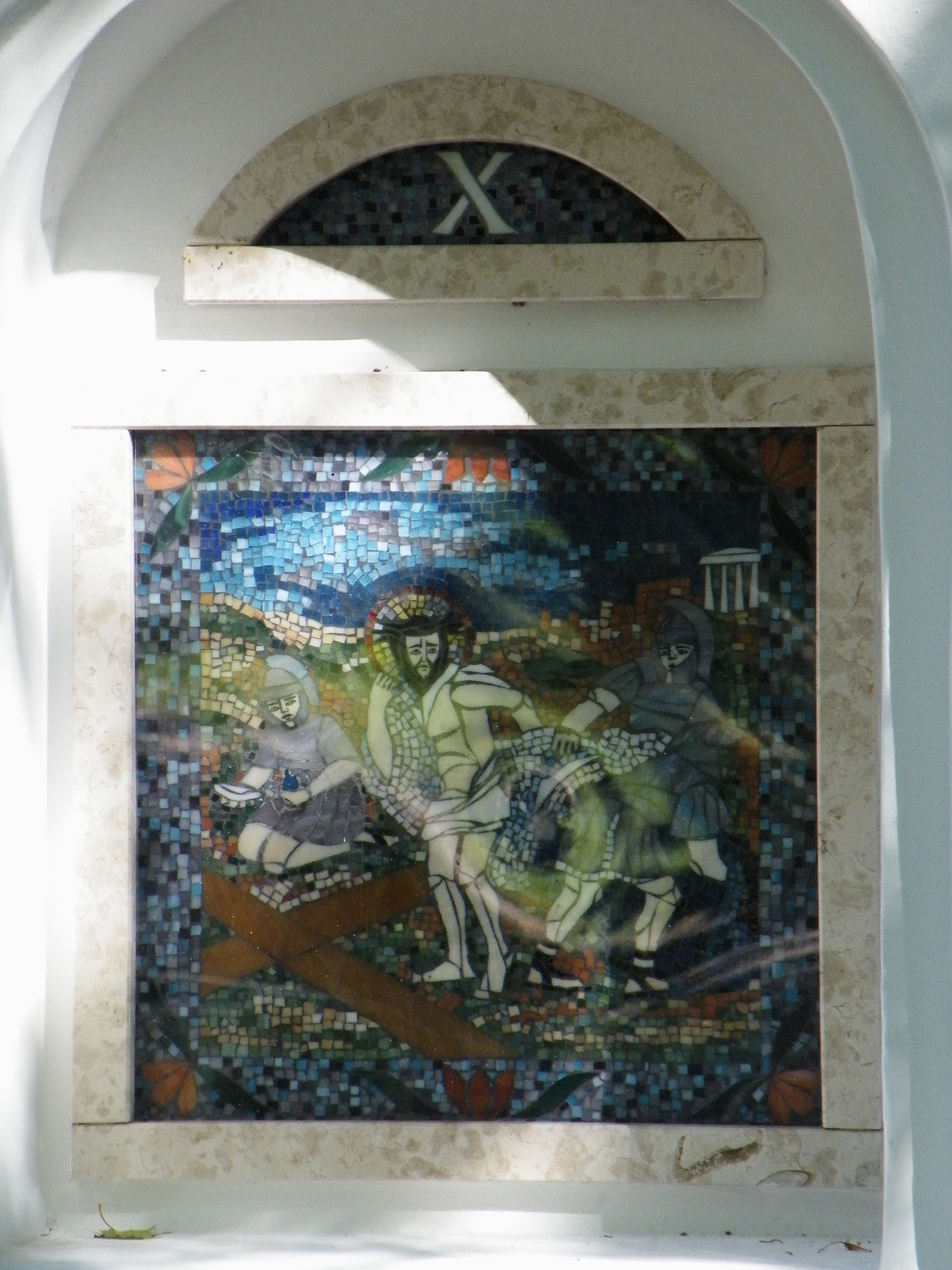 Stációk a Palóc ligetben, Balassagyarmaton